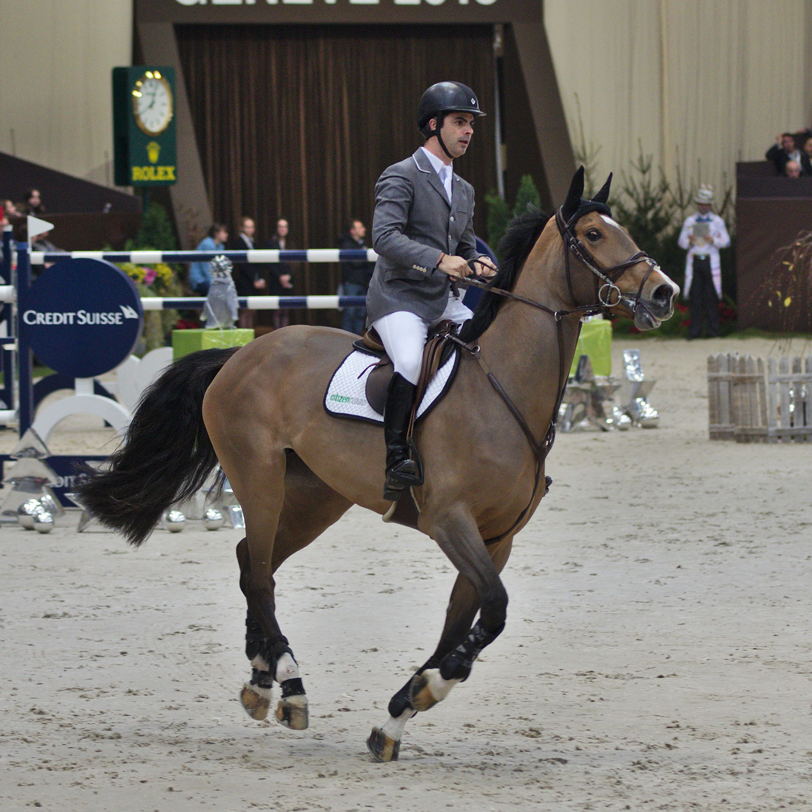 CHI Genève 2013 - 20131213 - Rodrigo Pessoa et Citizenguard Cadjanine Z